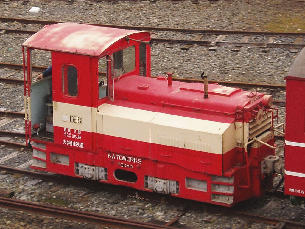 Oigawa Railway type DB8. at Kawane-Ryogoku Dept.